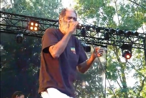 Junior Byles auf dem Garance Reggae Festival in Bagnols-sur-Cèze in Frankreich 2010